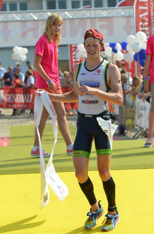 Pieter Heemeryck